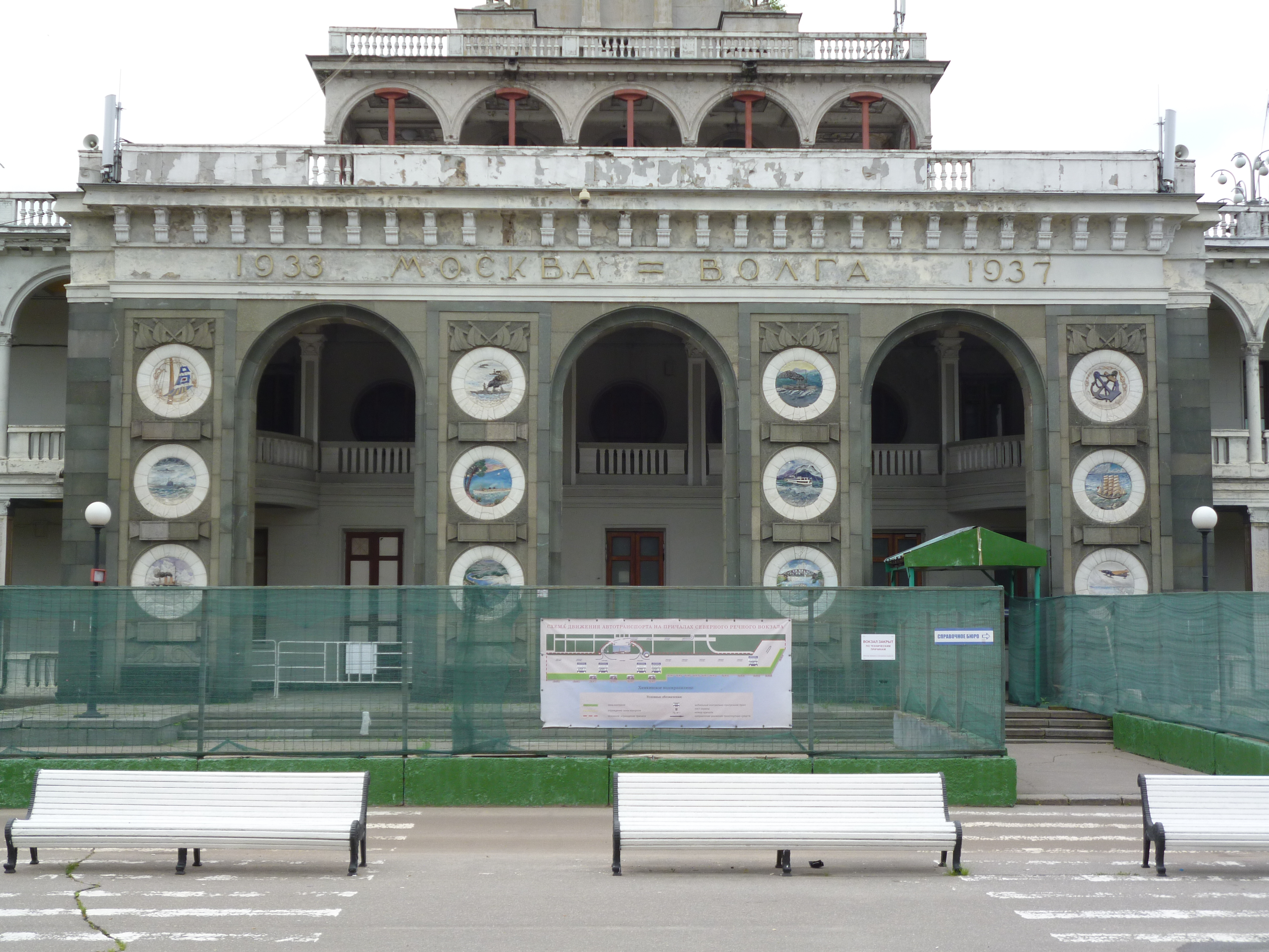 Северный речной вокзал в Москве. Вид со стороны парка.